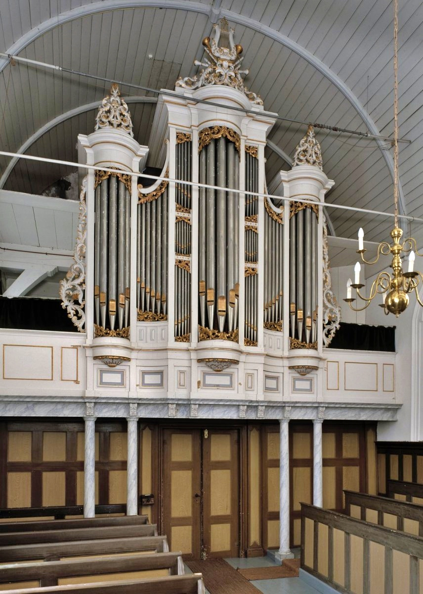 Nederlands Hervormde Kerk: Interieur, aanzicht orgel, orgelnummer 268 (opmerking: Gefotografeerd voor Het Historische Orgel in Nederland 1858-1865)